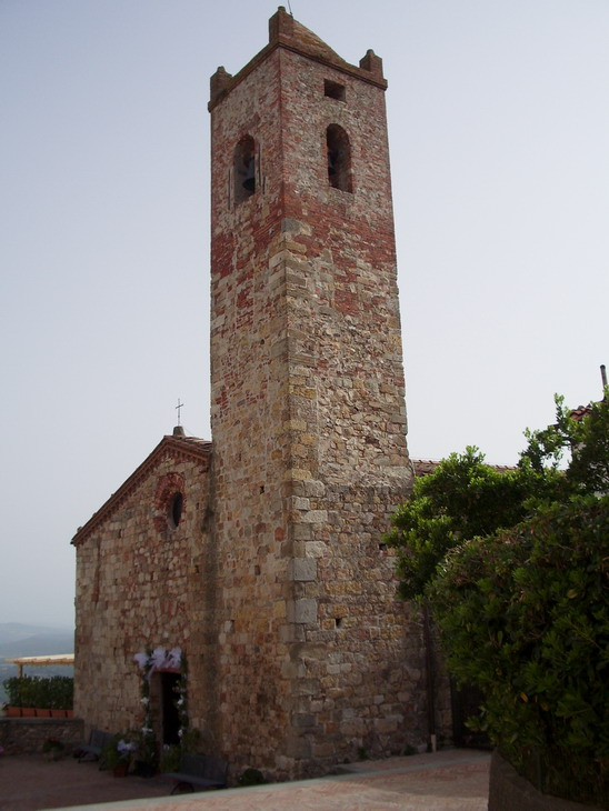 Chiesa di San Niccolò Montepescali (GR)